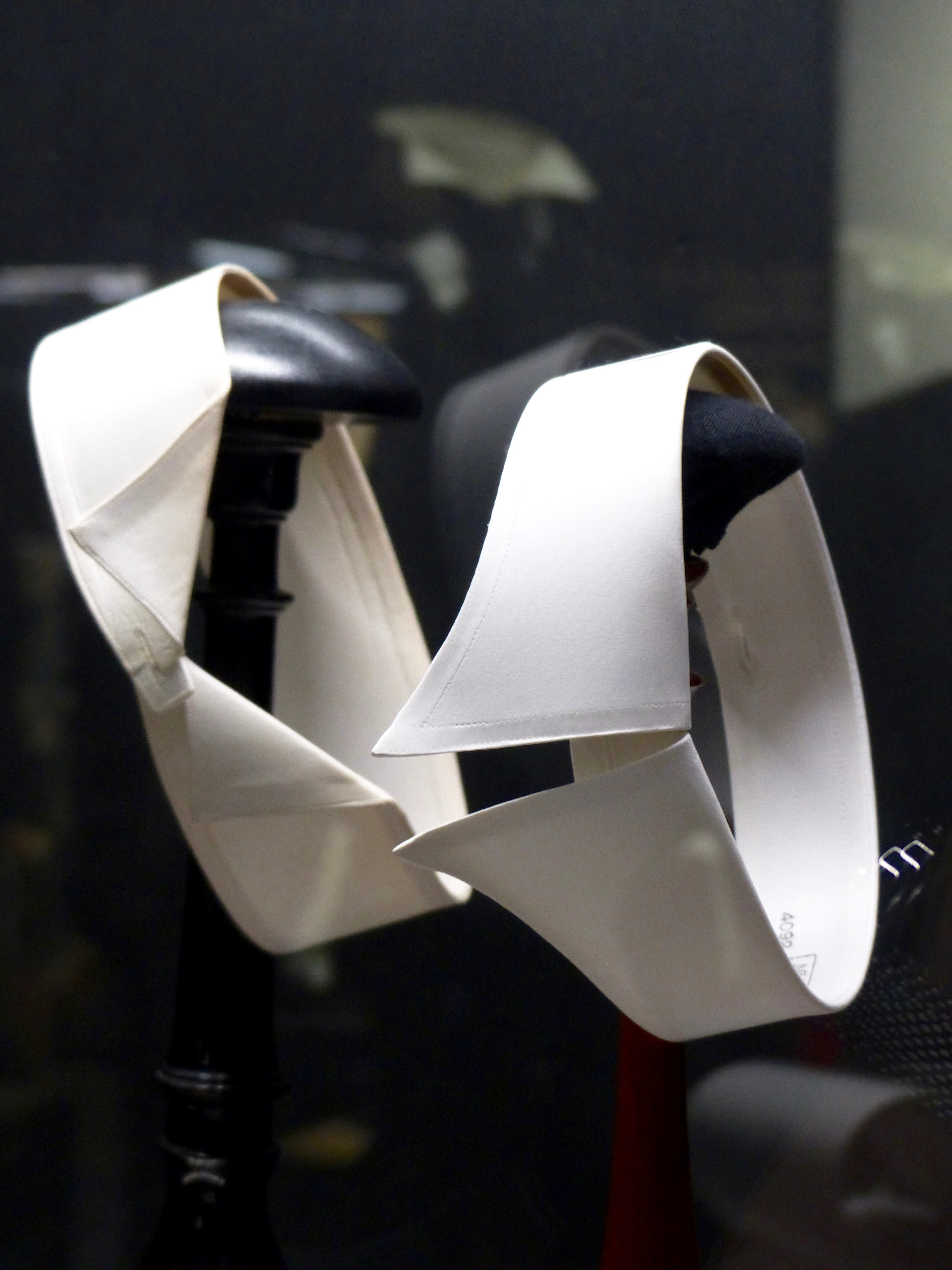 Sonderaustellung Macht der Mode: Wechselkragen GLAM-on-Tour: Industriemuseum Textilfabrik Cromford in Ratingen 2016 Wikipedianer fotografieren vom 10.–12. Juni 2016 die Exponate der Ausstellung „Die Macht der Mode“ im Industriemuseum Textilfabrik Cromford. This photo was taken during a project supported by WMDE.